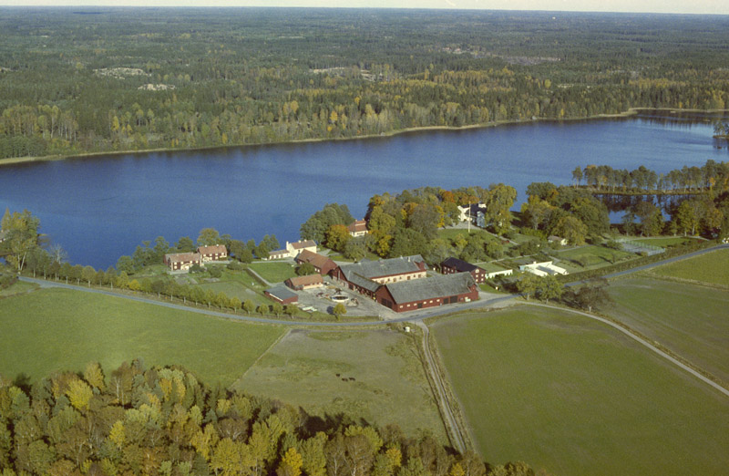 Fjällskäfte herrgård. Bilden är tagen mot (väderstreck): NO Motiv: Fjällskäfte Nyckelord: Flygbilder, Riksintressen Kategori: Herrgårds-/slottslandskapFjällskäfte herrgård. Bilden är tagen mot (väderstreck): NO.